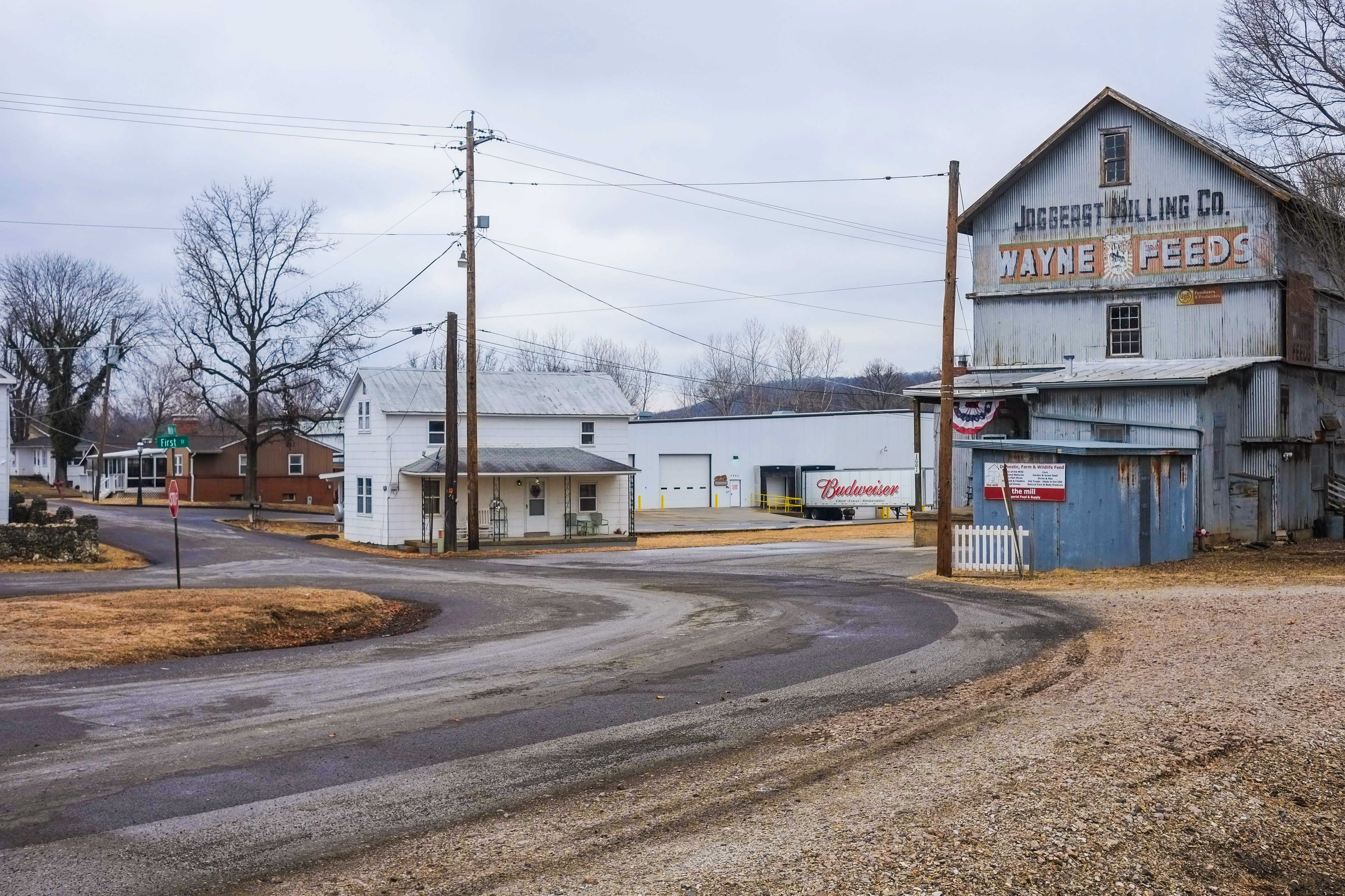 Wayne Feeds